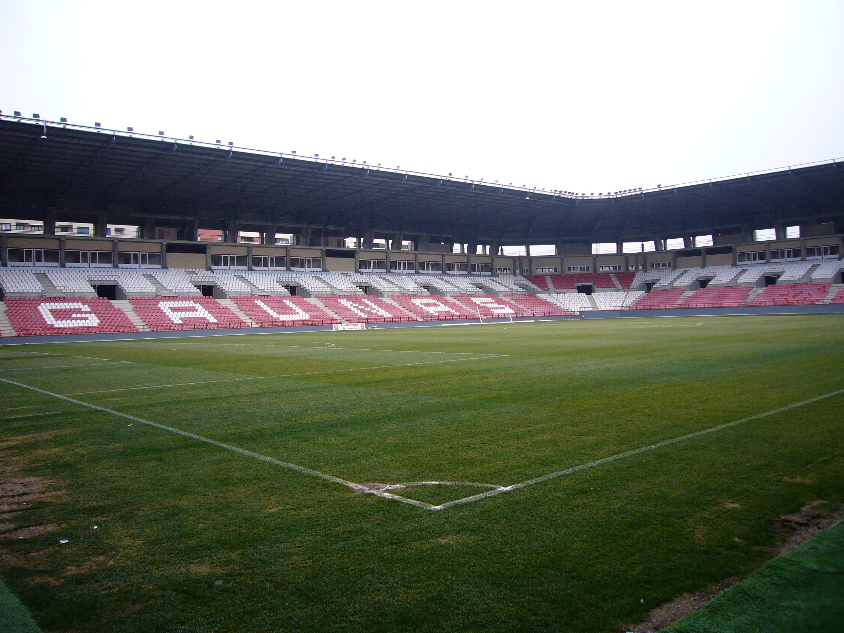 Vista desde una esquina del Estadio Nuevo Las Gaunas.